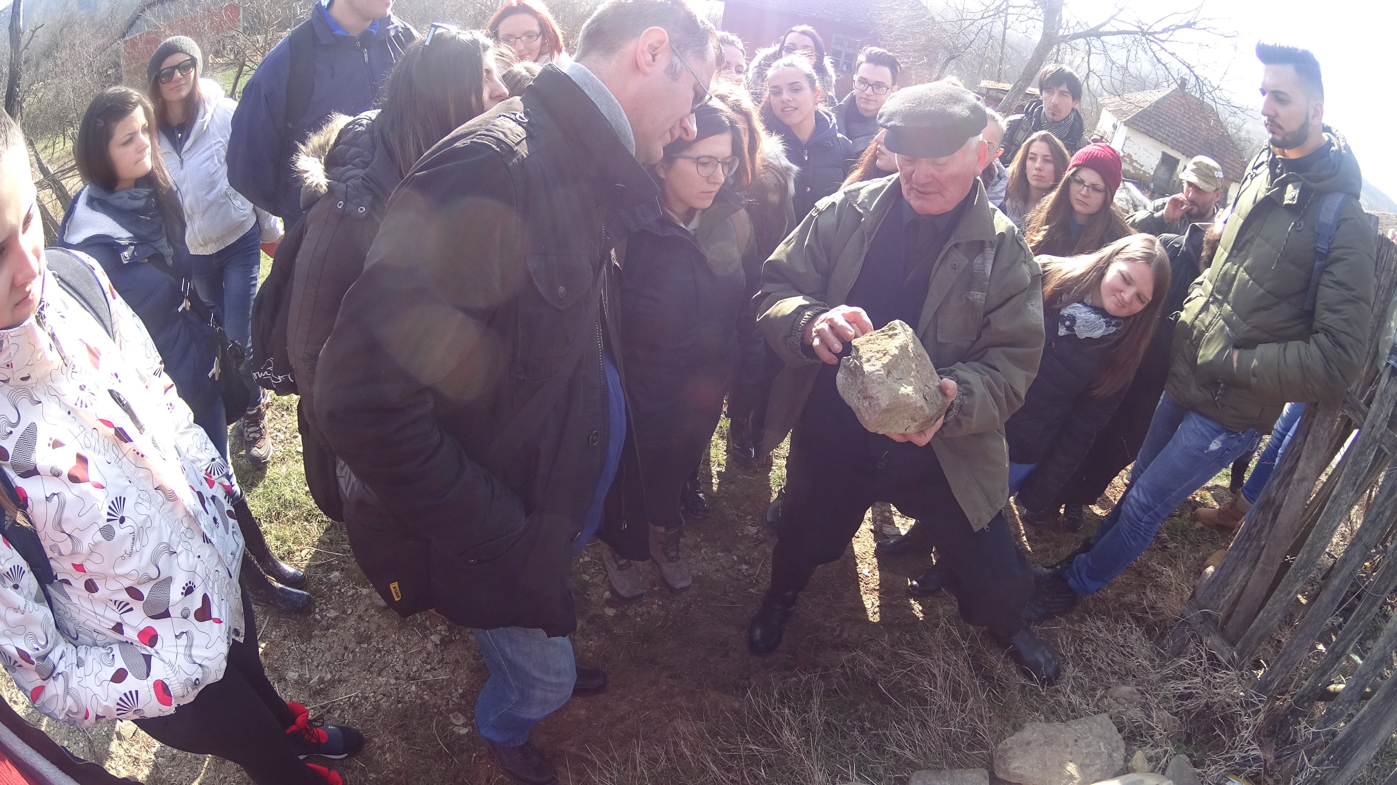 Српски (ћирилица): Ово је фотографија заштићеног природног добра у Србији под шифром: СП241 This is a a photo of a natural area in Serbia with ID: СП241 Палеонтолошки локалитет, Споменик природе Пребреза 02